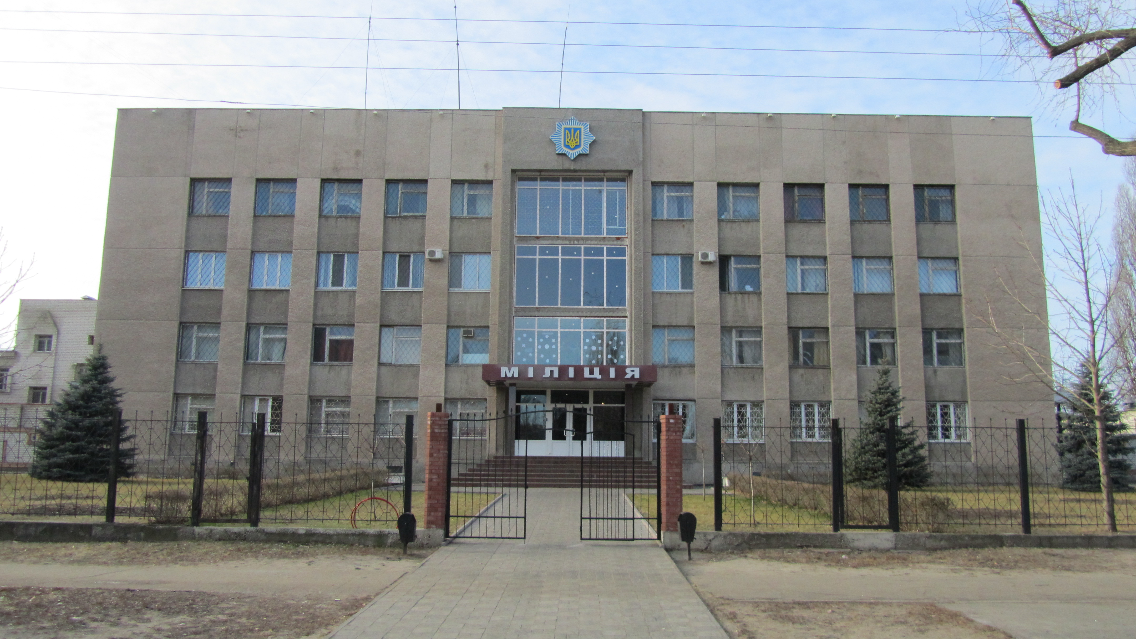 Автозаводський районний відділок УМВС України у Кременчуці